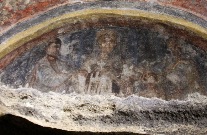 Immagini di Gesù insieme ai suoi apostoli scoperte nel 2010 nelle catacombe di Santa Tecla, vicino alla Basilica di San Pietro a Roma. Gli affreschi, tra cui il presente, mostrano le facce di Gesù, ora con la barba, e dei 12 apostoli. In particolare si notano le prime caratteristiche delle raffigurazioni tipiche degli apostoli, come la fronte rugosa, la testa calva e la barba a punta di San Paolo. vedi anche